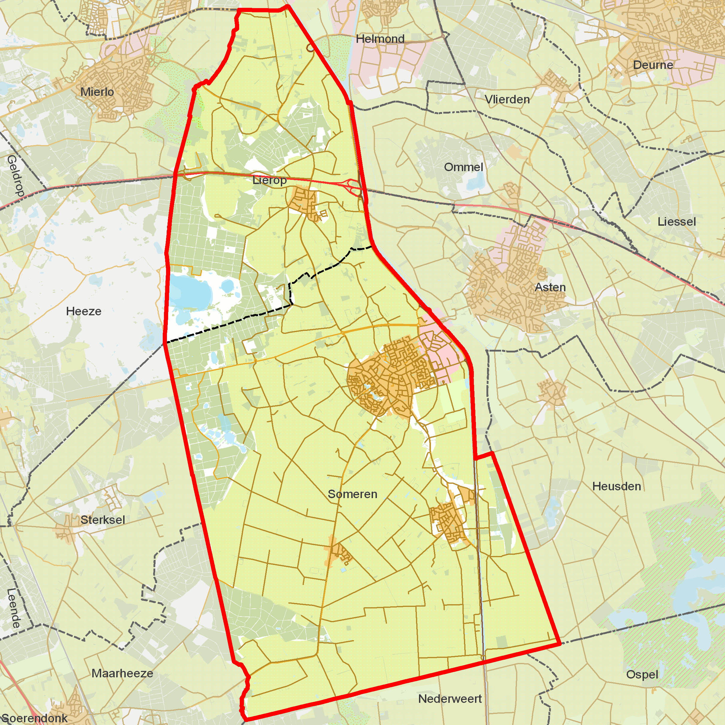 BAG woonplaatsen - Gemeente Someren.png